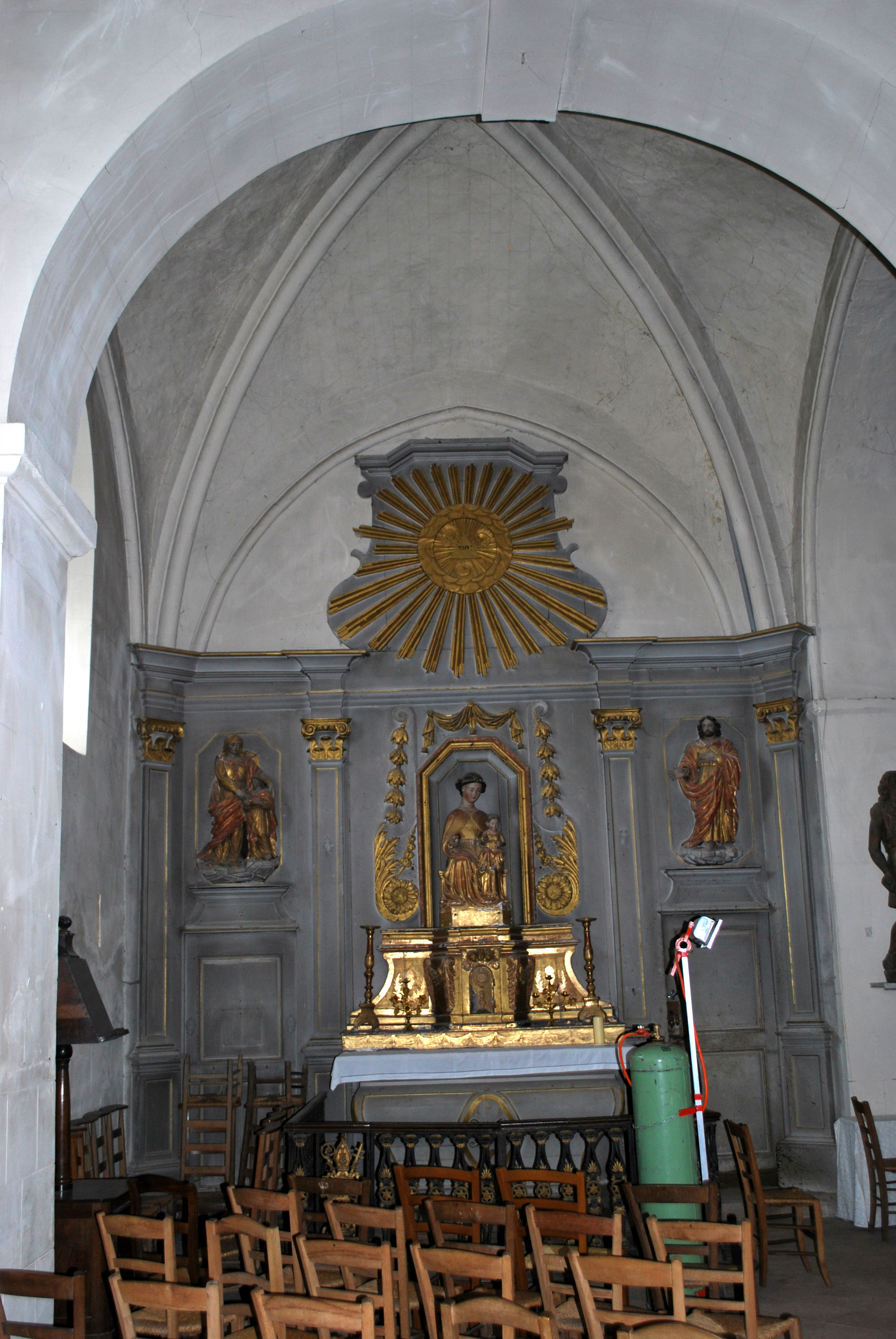 Saint-Morillon, église Saint-Maurille